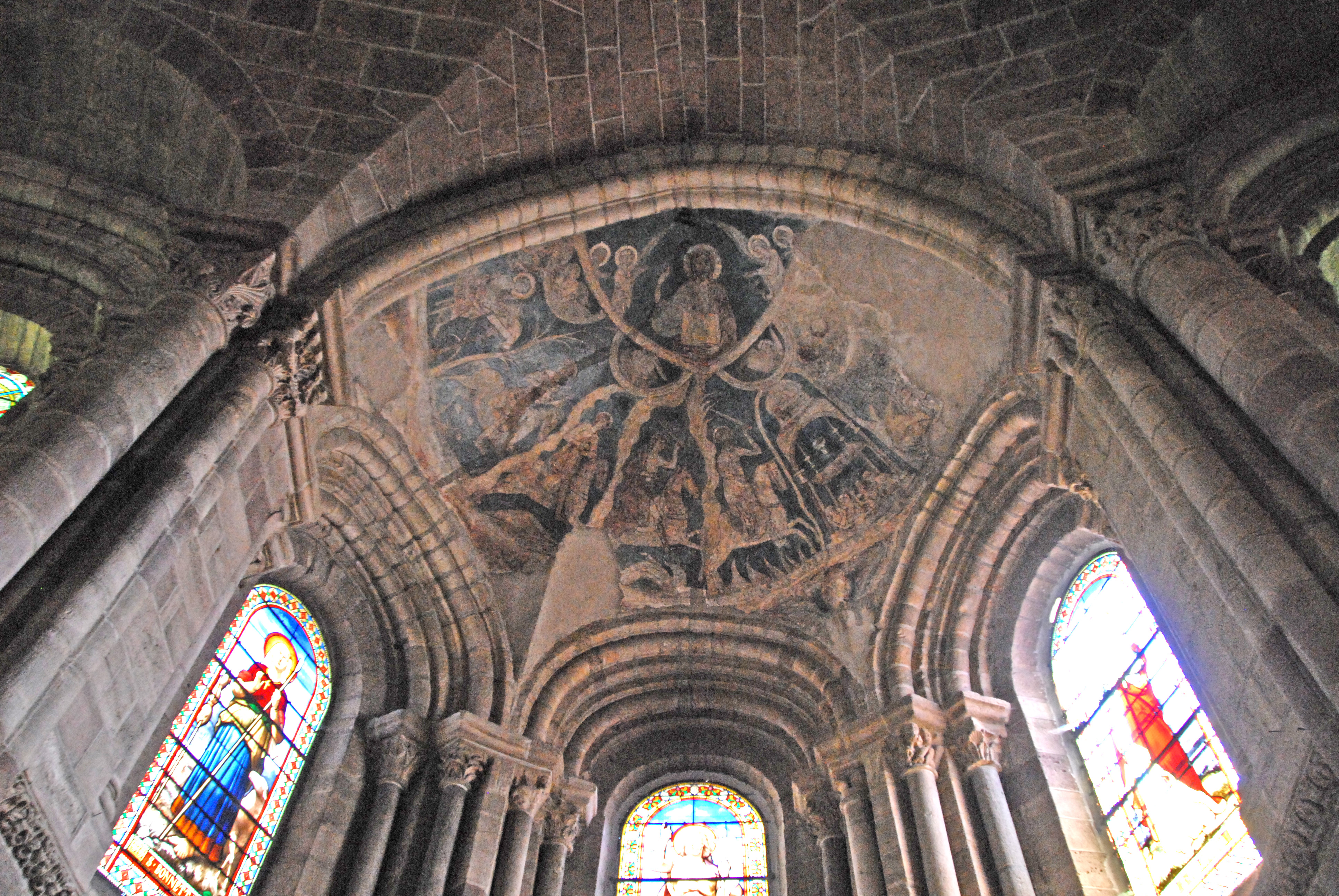 Sain-Julien Brioude, Kranzkapelle mit Fresko